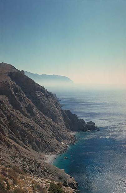 Steilküste von Amorgos. Kamera: Minolta 9000 (von Kodak Photo CD)